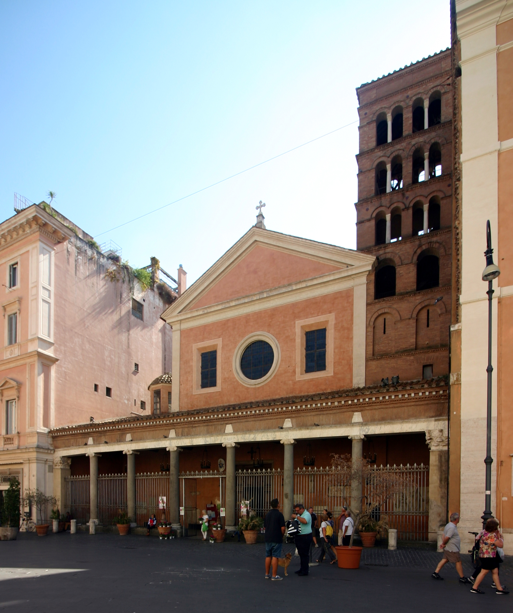 San Lorenzo in Lucina - Rome